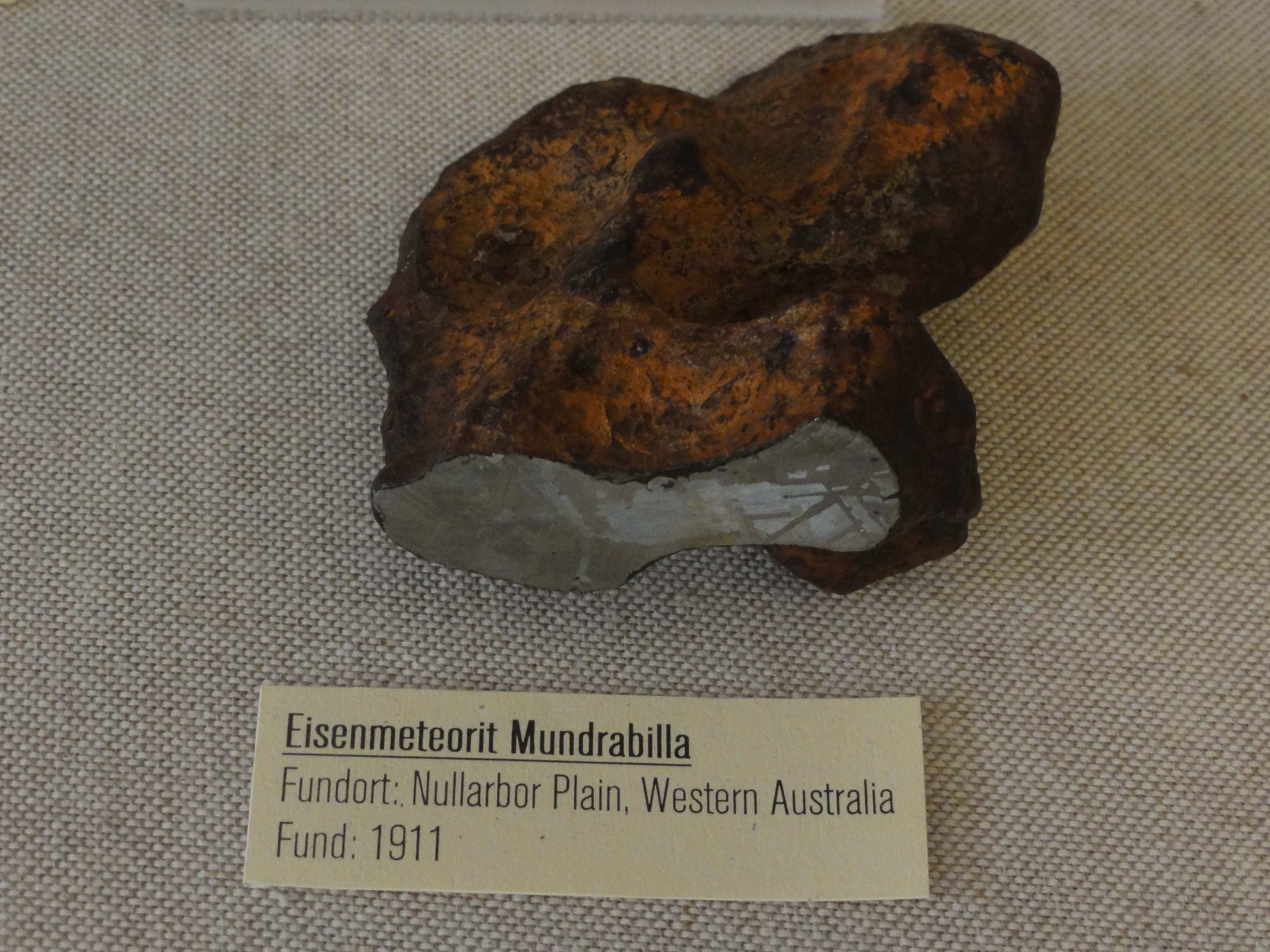 Basel — Pharmazie-Historisches Museum der Universität